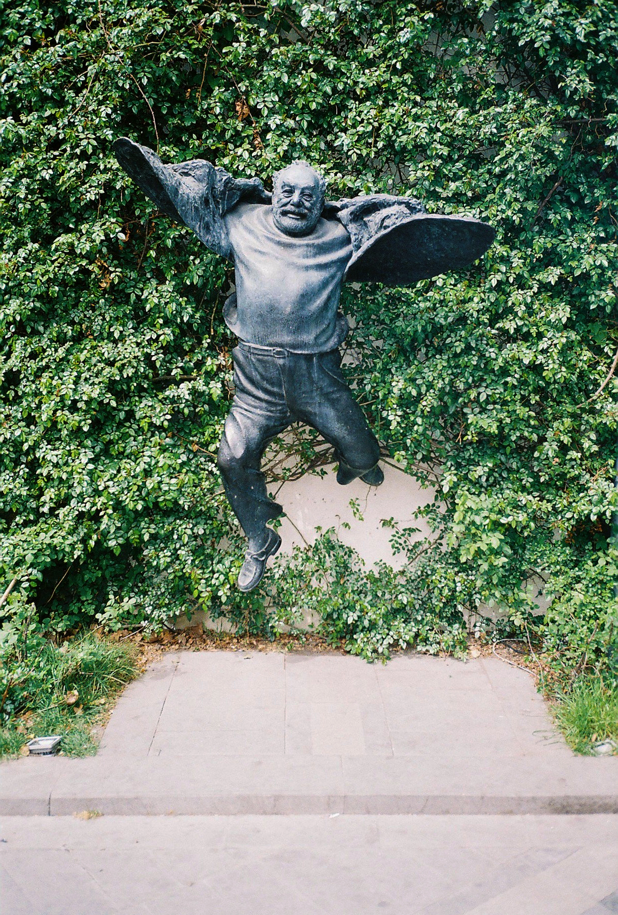 Sergueï Paradjanov